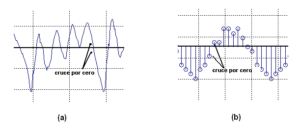 Aparato Fonador Humano